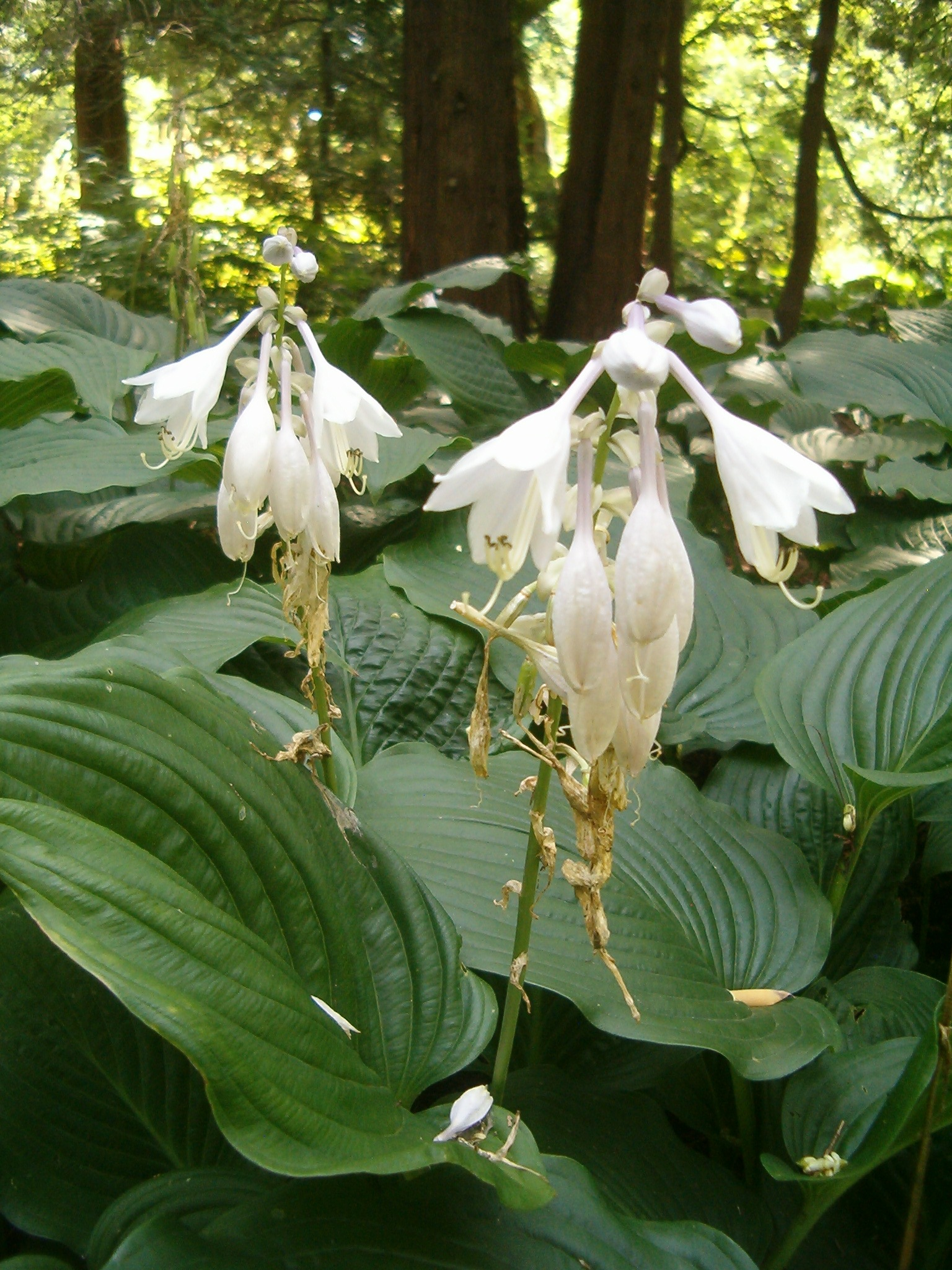 At Botanical Gardens Berlin-Dahlem Species Hosta elata